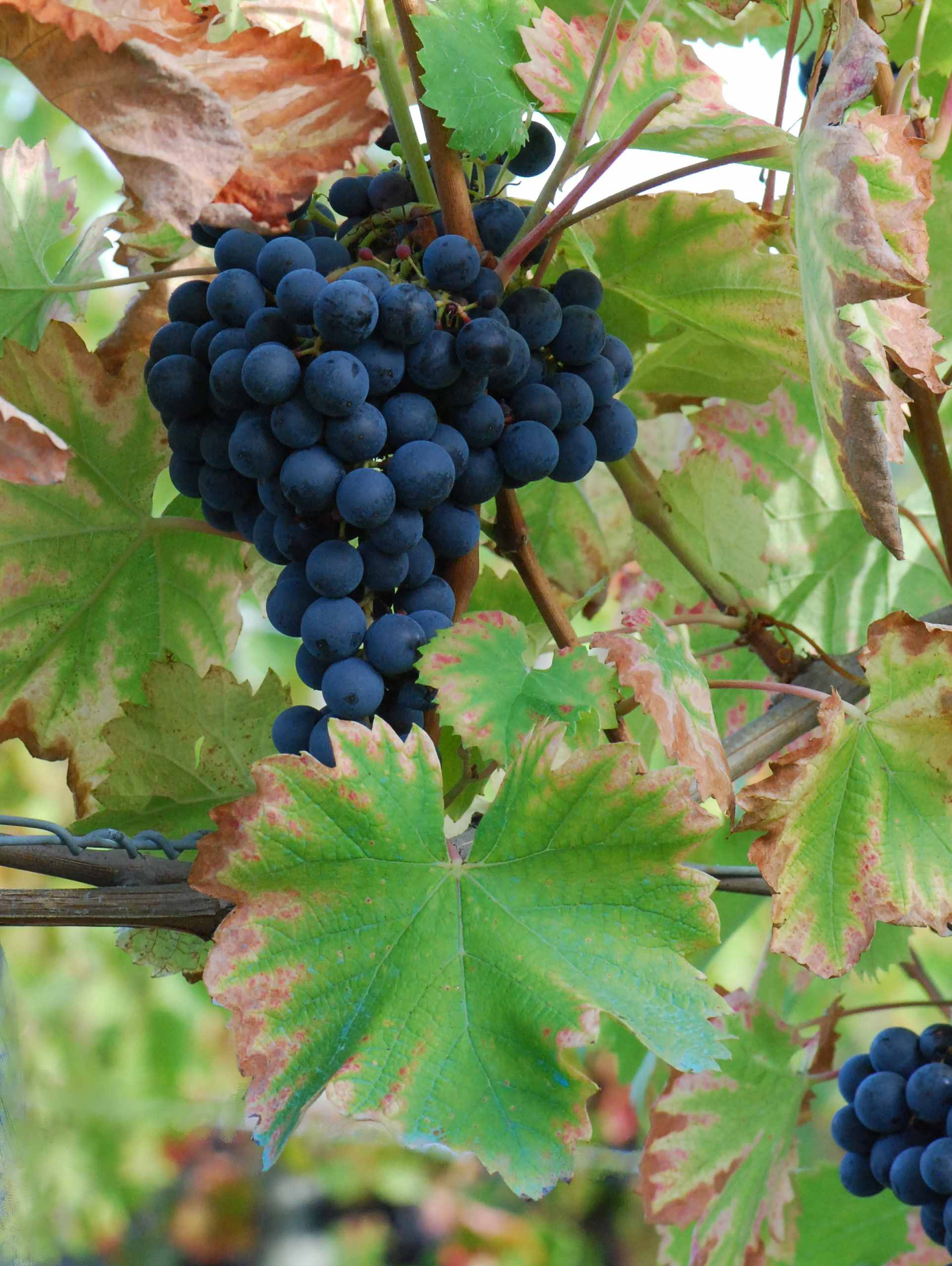 Mourvèdre, Conservatoire du vignoble charentais, Cherves